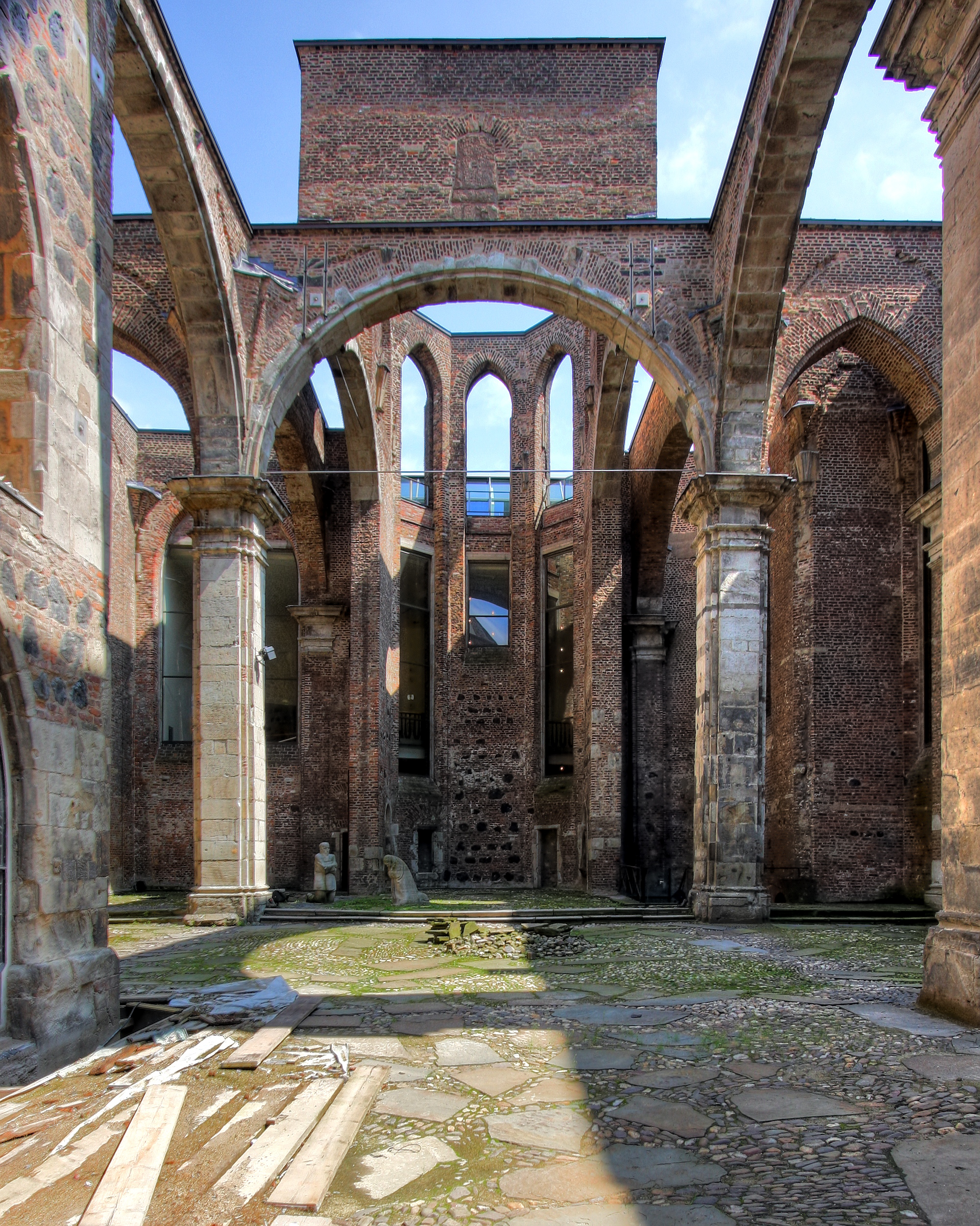 Ruinen von Alt St. Alban, Köln.